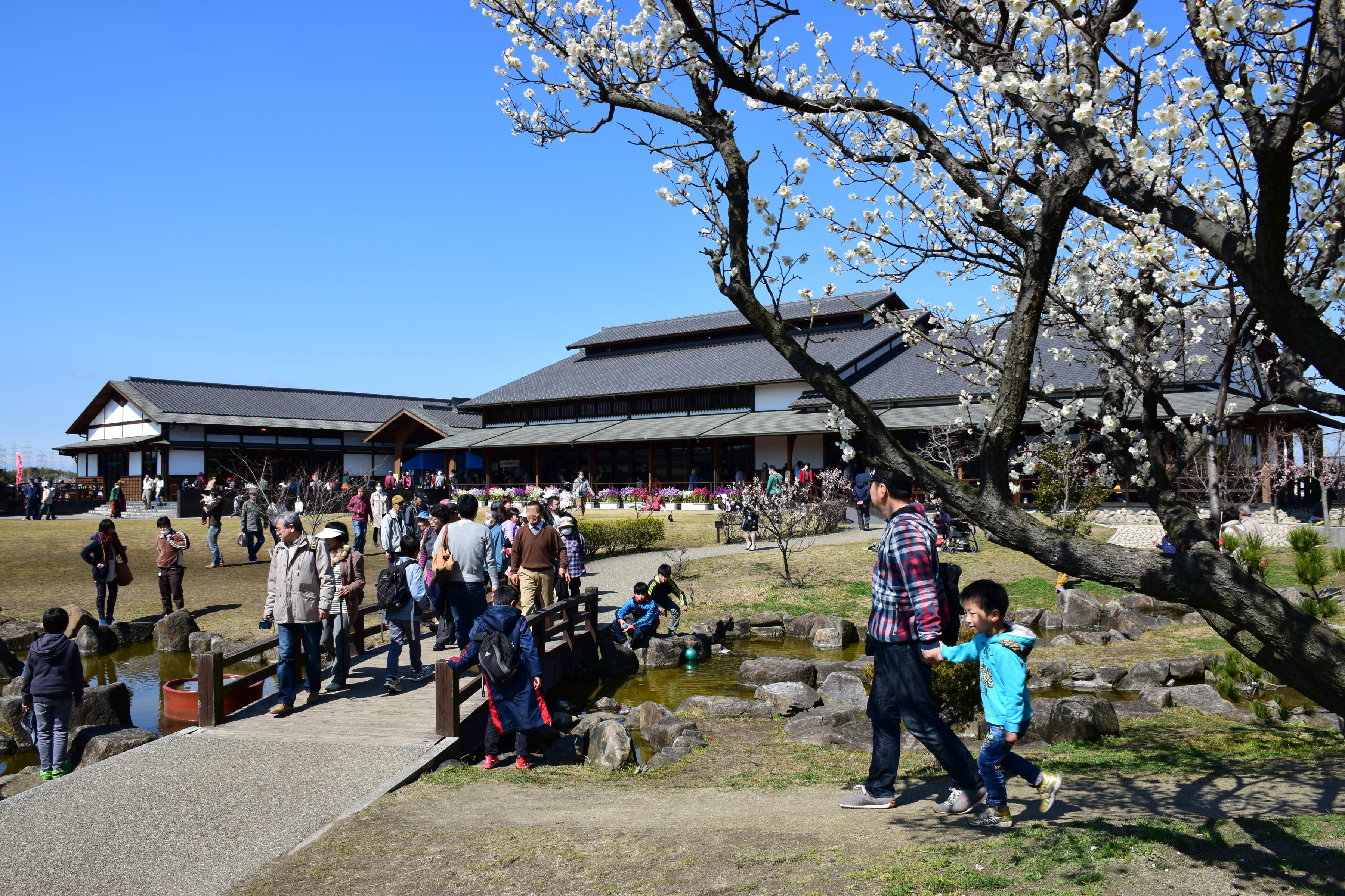 佐布里緑と花のふれあい公園